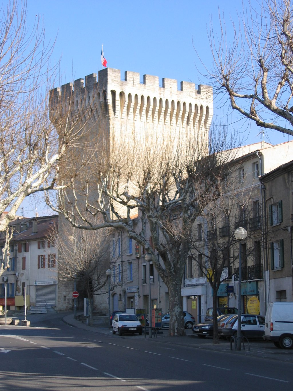 Une porte fortifiée de la ville de Carpentras (Vaucluse, France)